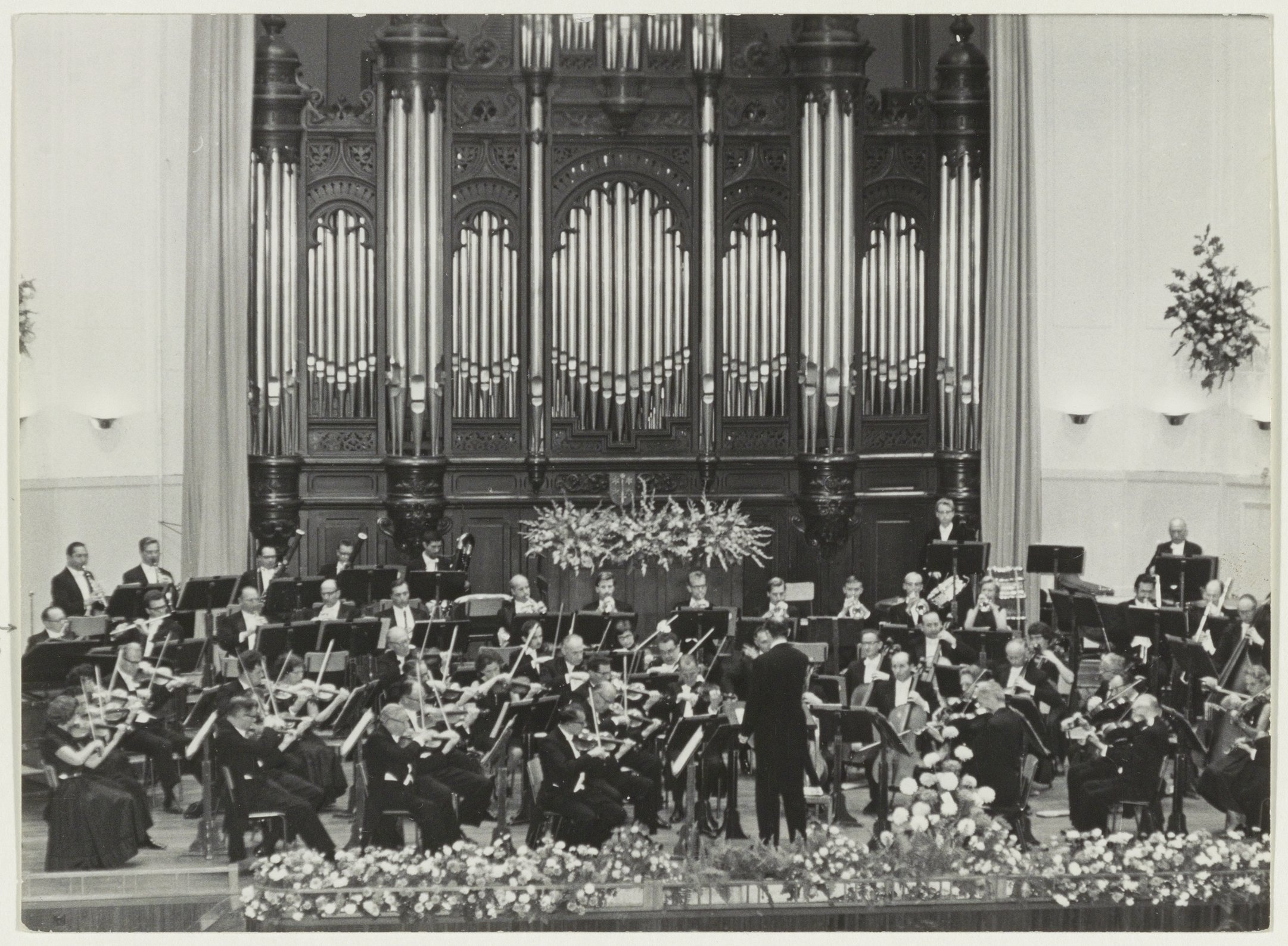 CollectieCollectie Fotoburo de BoerInventarisnummerNL-HlmNHA_54016026NL-HlmNHA_1478_2039kBeschrijvingHet Noordhollands Philharmonisch Orkest in het ConcertgebouwFotonummerNL-HlmNHA_1478_2476DocumenttypeHistorieprenten, tekeningen en foto'sVervaardigerBoer, Cees de (1918-1985) Soort vervaardigerFotograaf LandNederland ProvincieNoord-Holland GemeenteHaarlem PlaatsHaarlem StraatLange Begijnestraat Begindatum01-10-1963Einddatum01-10-1963TechniekFoto Trefwoordenkunst en cultuur